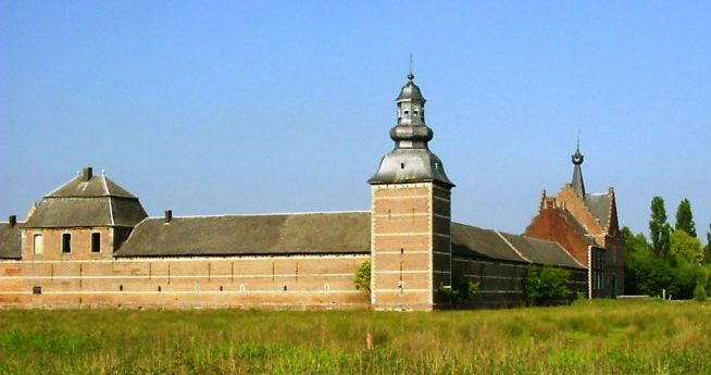 Herkenrodeabdij